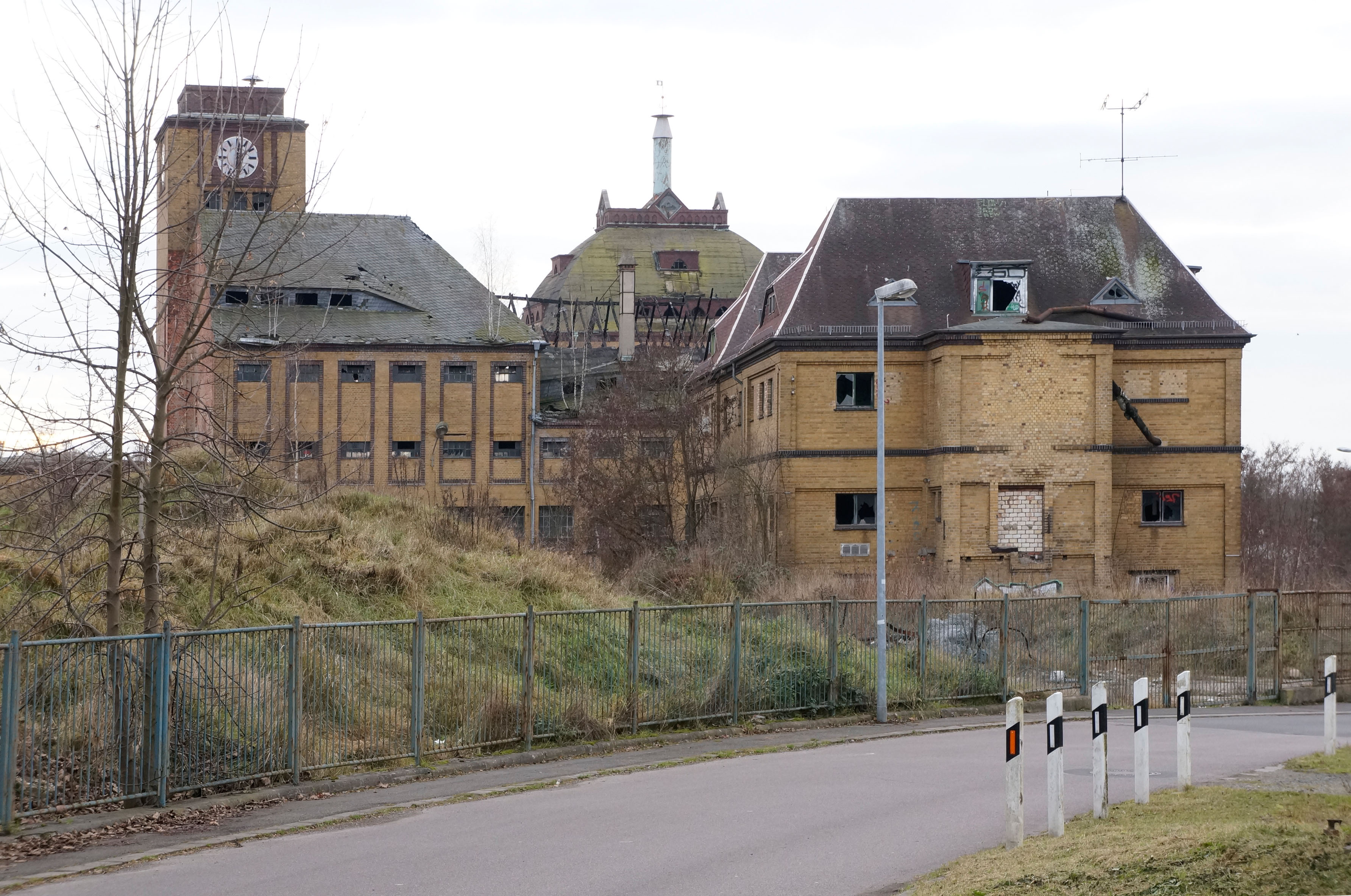 ehemaliges Gelände der Sternburg Brauerei in Leipzig/Lützschena